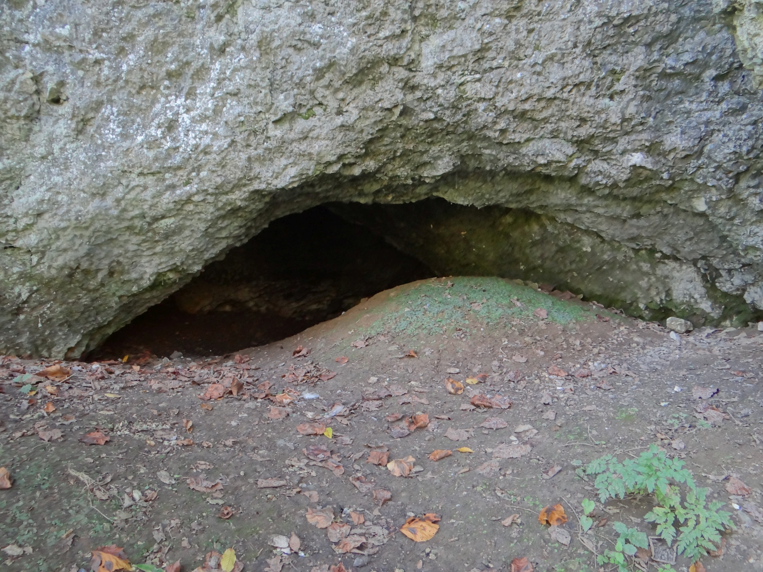 Jaskinia Gaudynowska